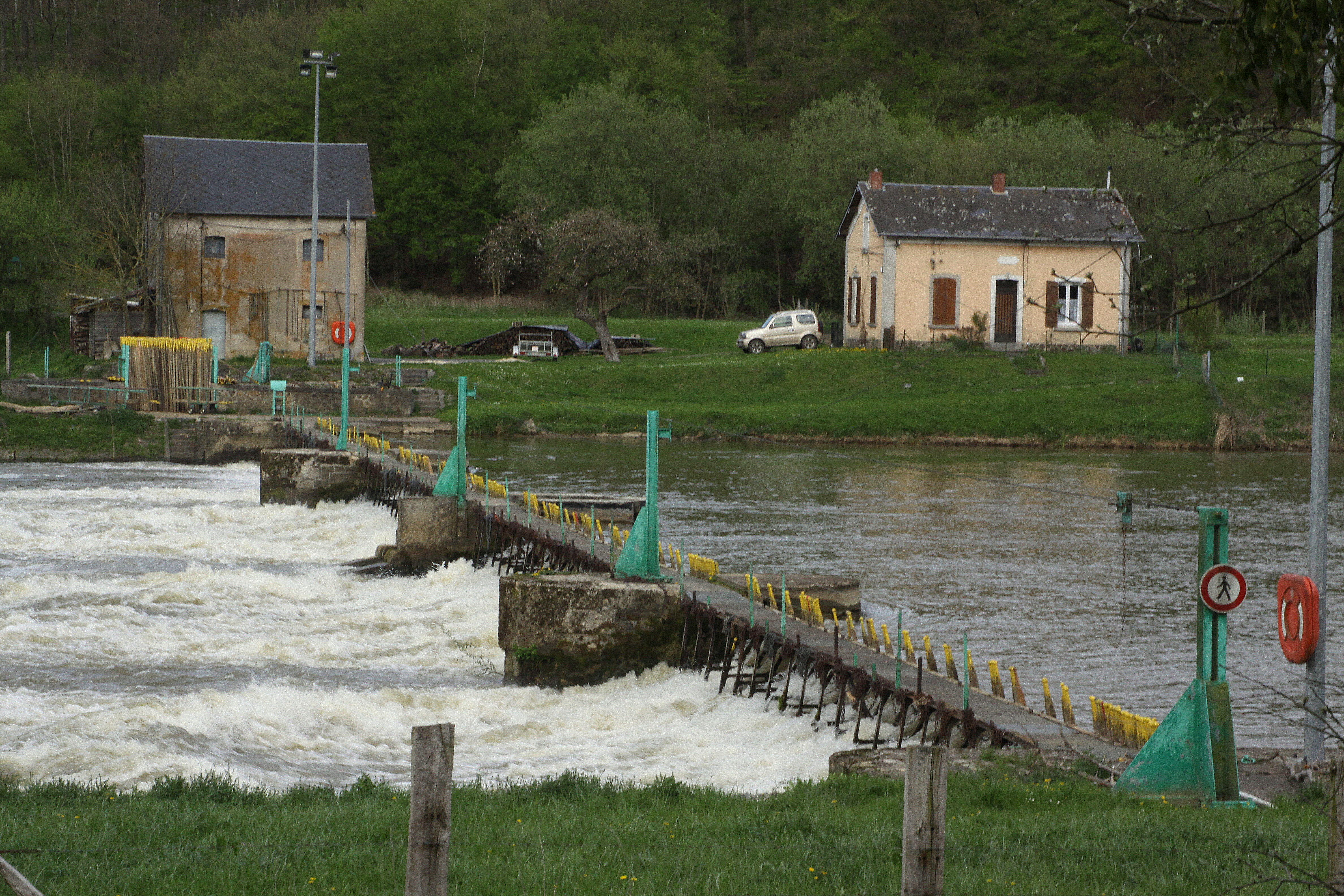 D'Nolewier vu Montigny-sur-Meuse